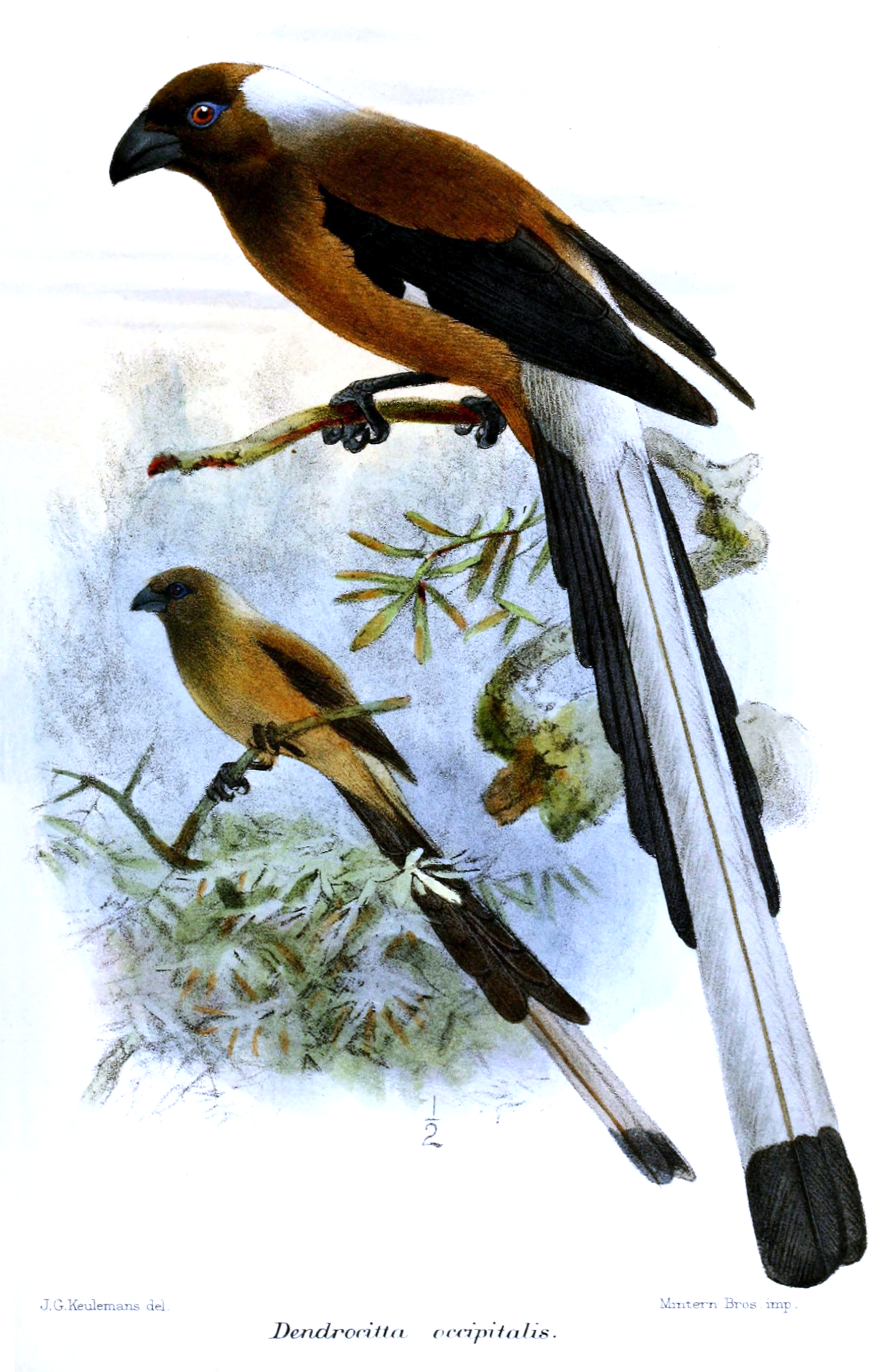 Dendrocitta occipitalis, Sunda Treepie